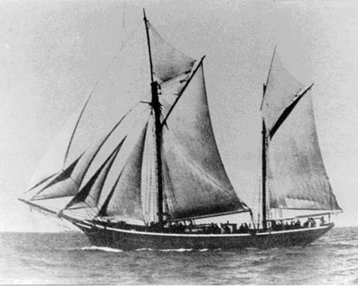 אוניית המעפילים עמירם שוחט